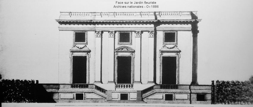 Projet Petit Trianon 1761 - Archives nationales O1 1886 - Façade Jardin fleuriste